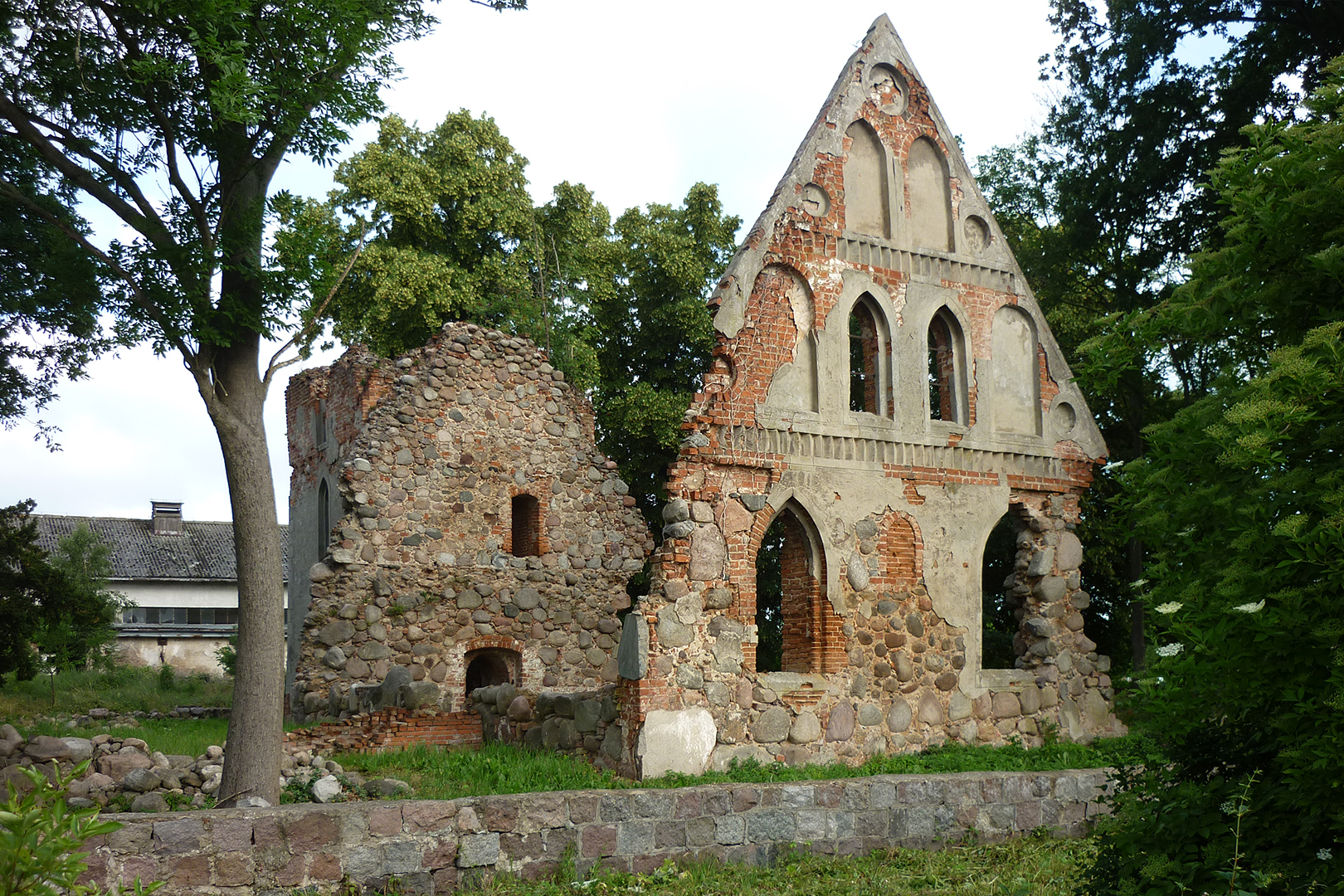 kościół (ruina), cmentarz przykościelny Węgorzyce